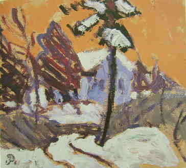 Aftonljus, oilpainting